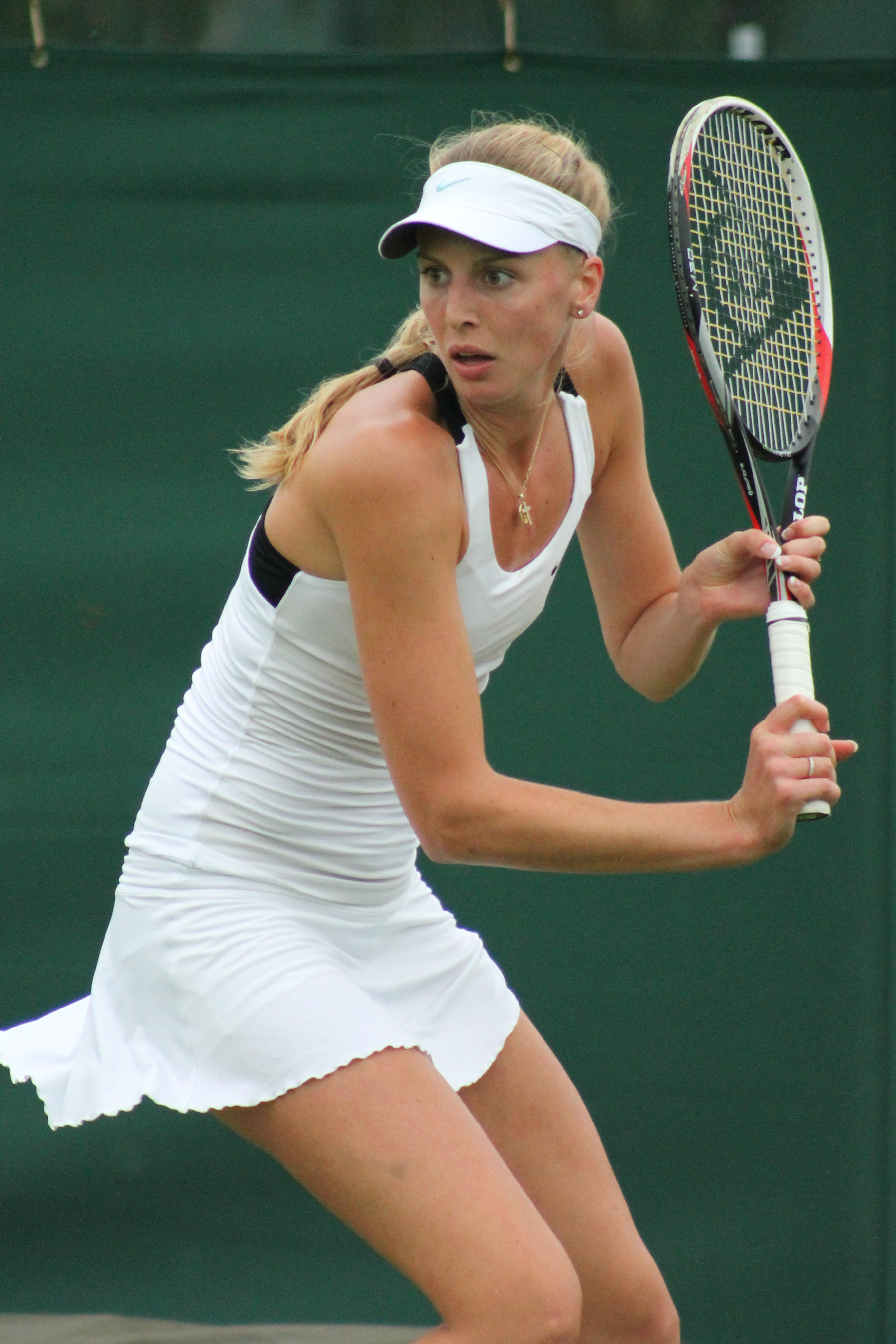 Naomi Broady